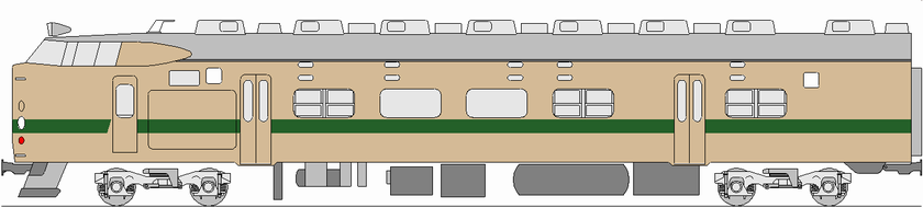 クハ715形。側面図